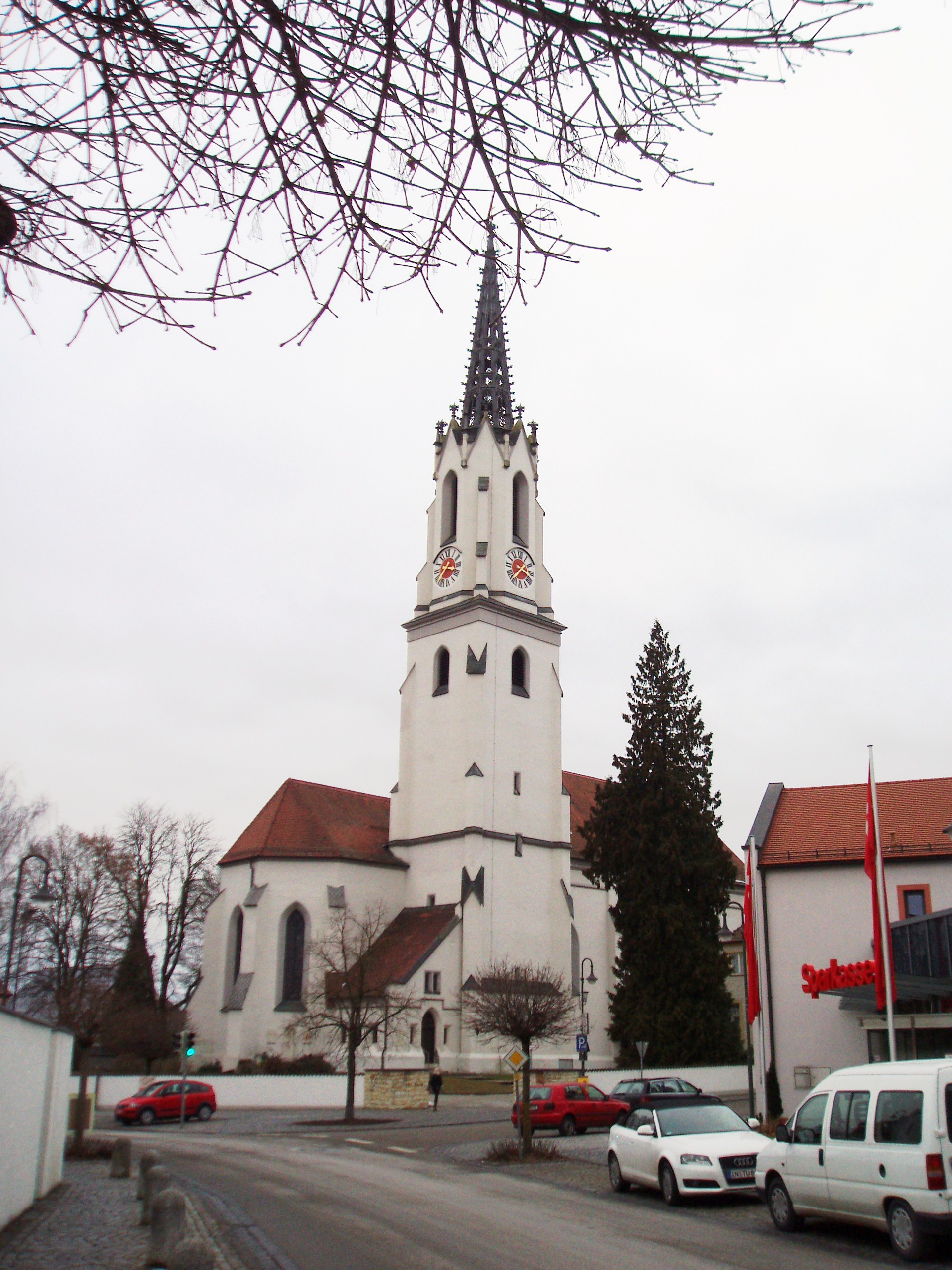 Gaimersheim im Landkreis Eichstätt, Kath. Pfarrkirche